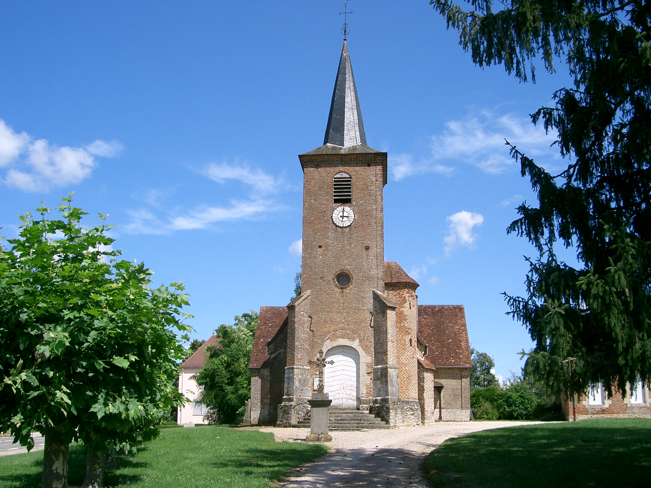 église de Sens-sur-Seille (Saône-et-Loire - France)